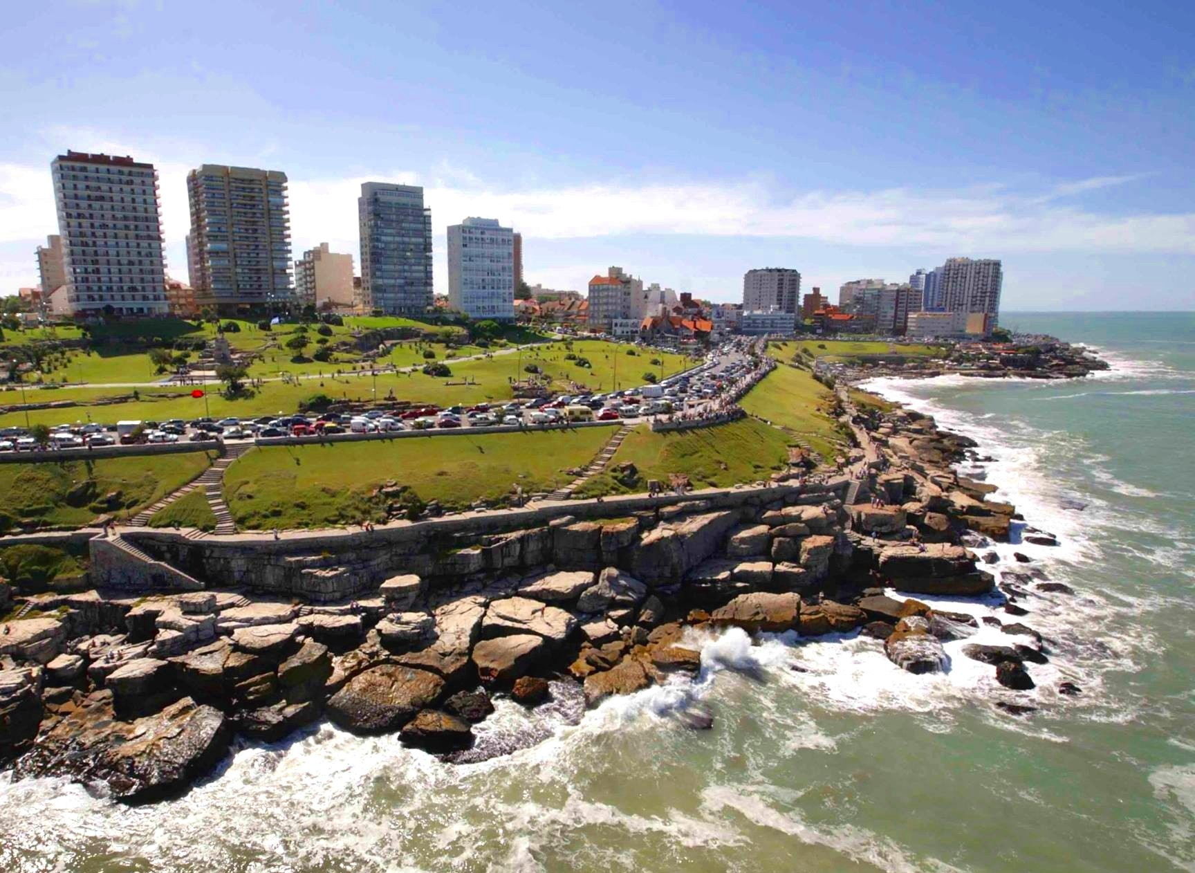 Parque San Martin y Cabo Corrientes